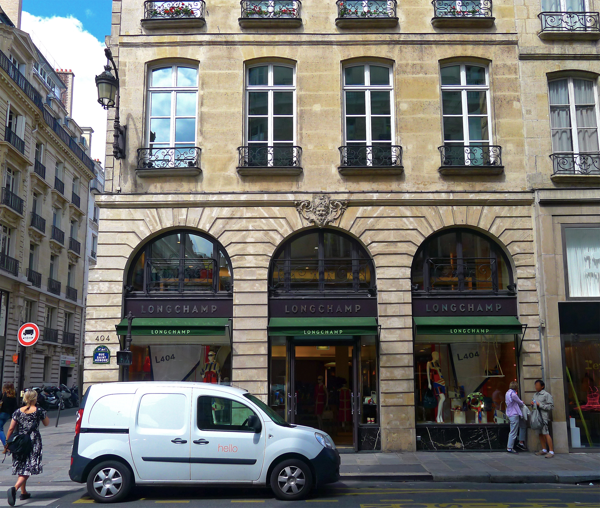 Immeuble (Inscrit) - n°404 rue Saint-Honoré - Paris Ier .